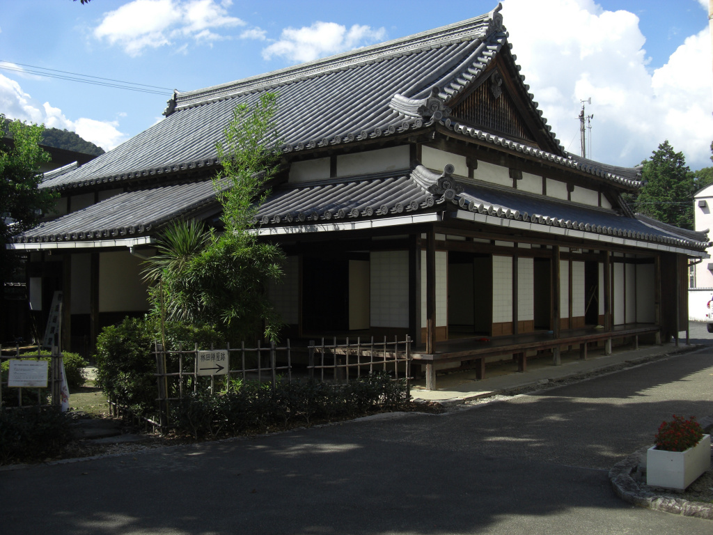 姫路市指定重要文化財 林田藩 敬業館講堂 2012年9月2日撮影